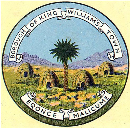 Die geskiedkundige dorpseël.